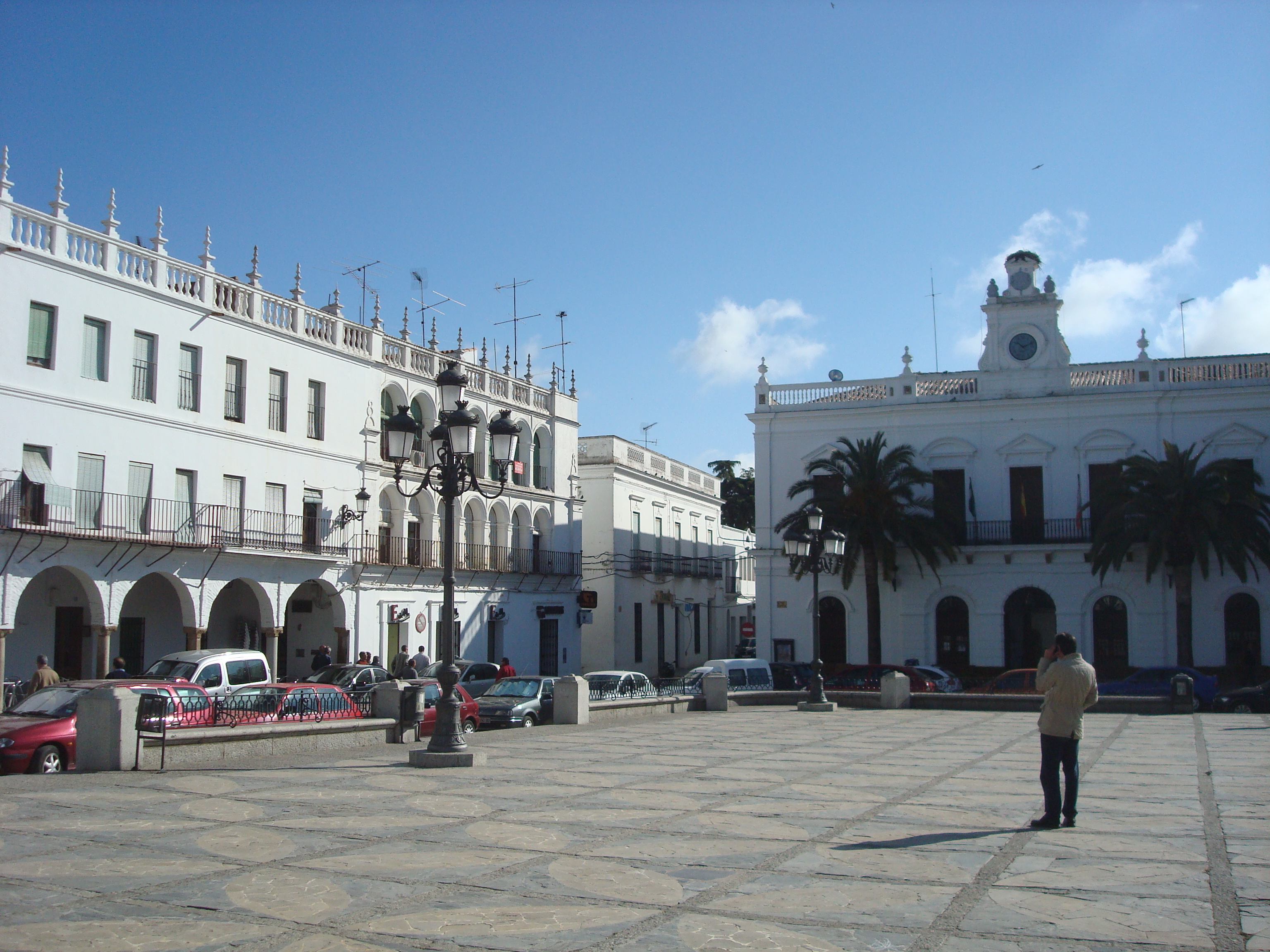 Llerena - 005